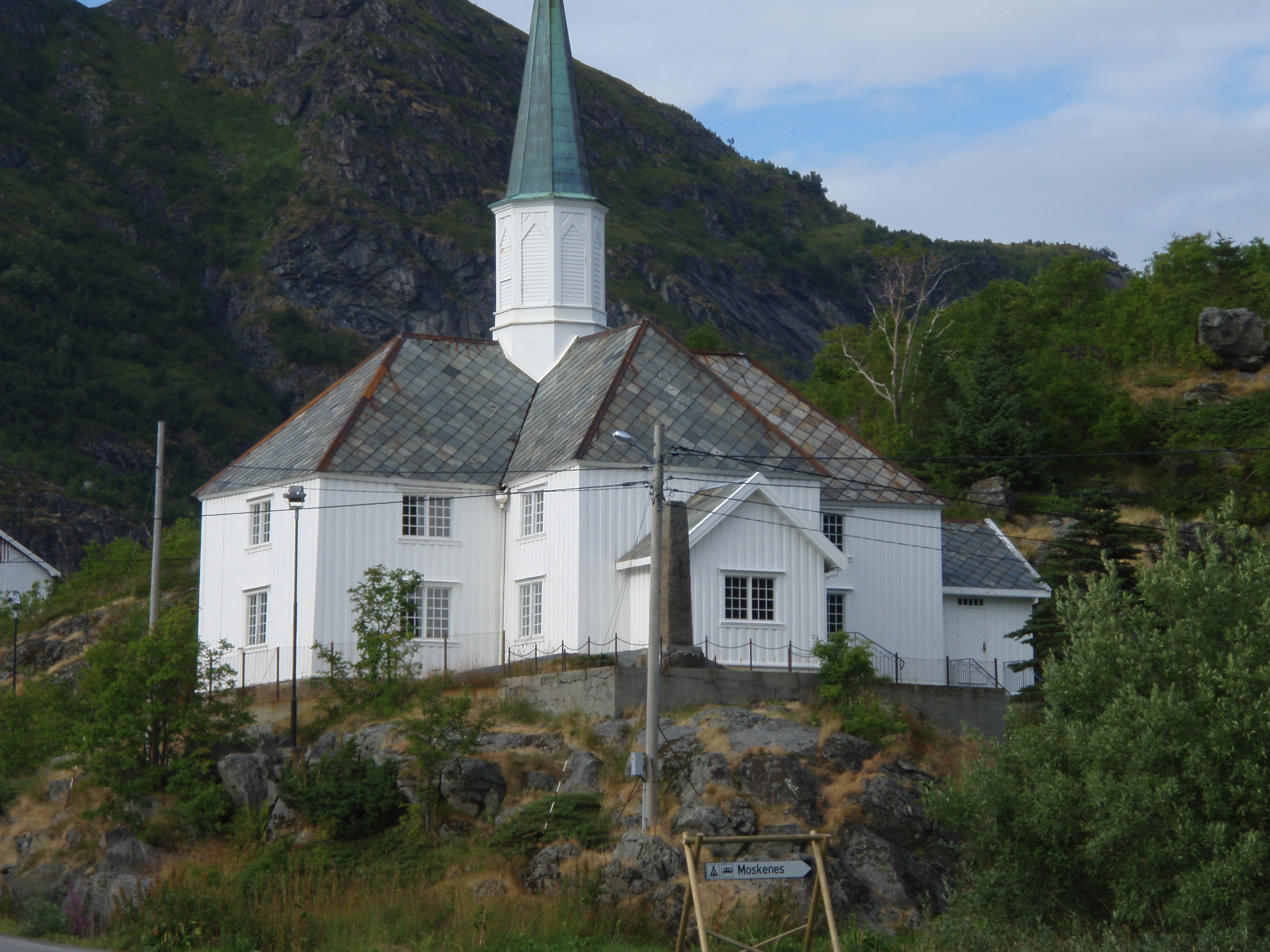 Moskenes kirke (Nordland)